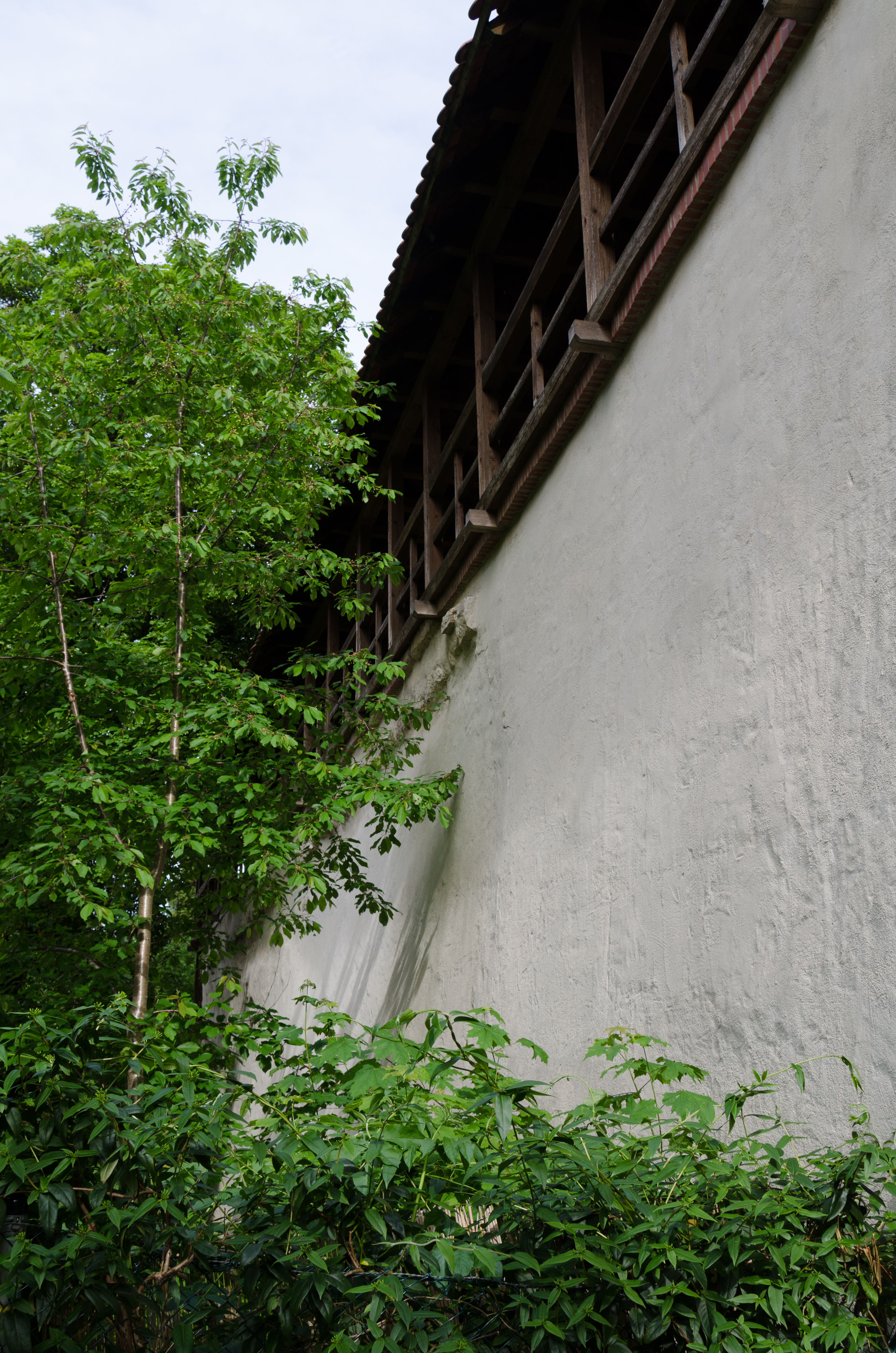 Bopfingen, Stadtmauerrest, Vordere Pfarrgasse